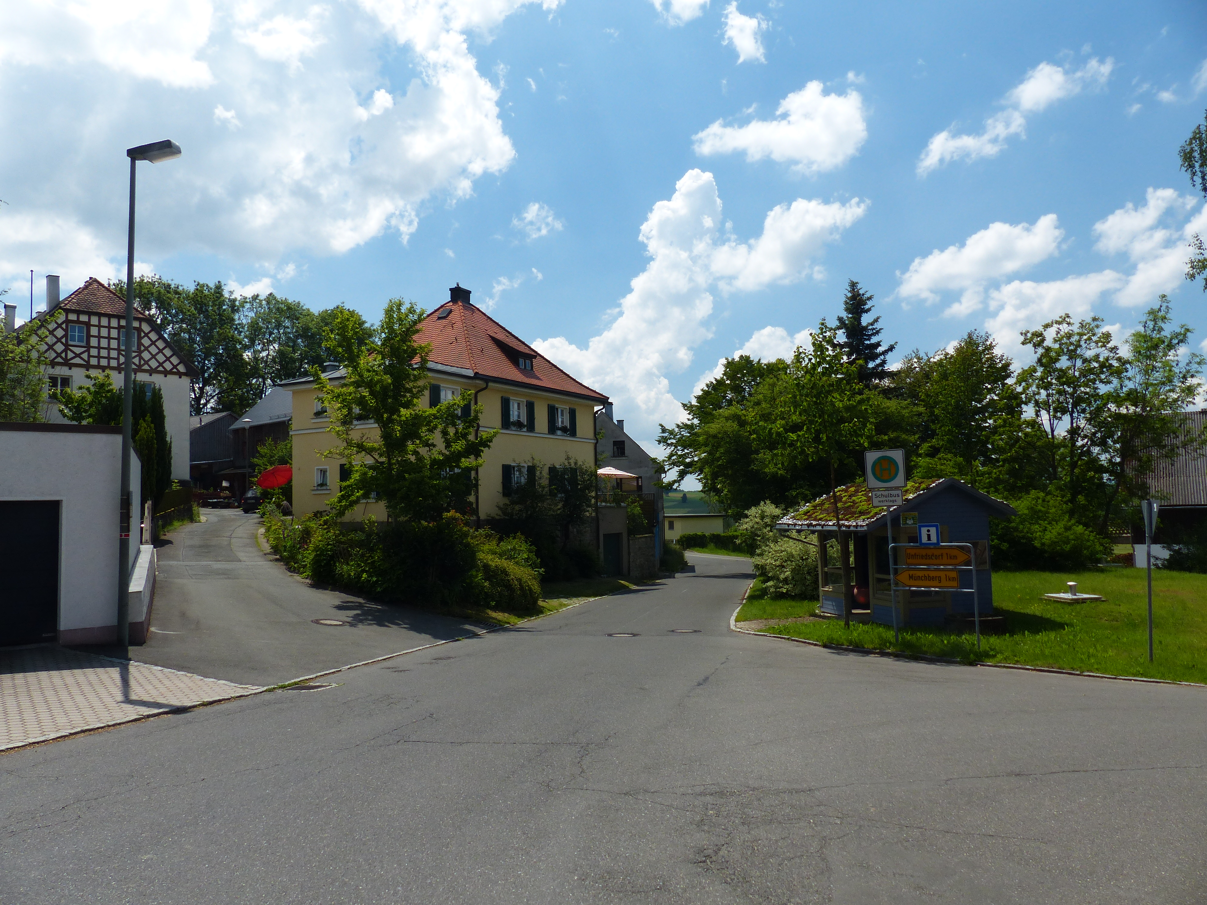 Ortsansichten von Gottersdorf